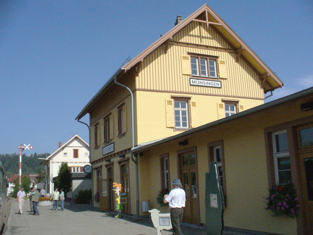 Muensingen-Württemberg - Bahnhof